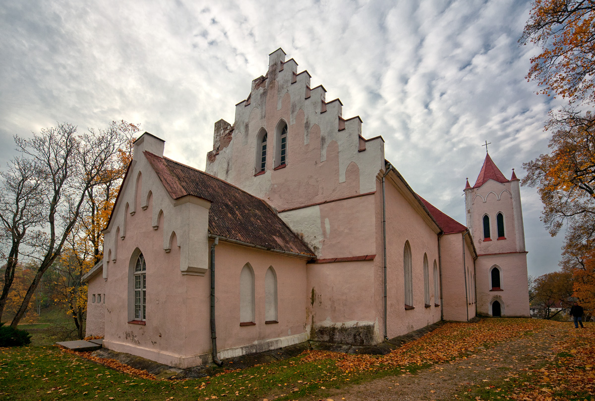 Aizputes Sv.Jāņa luterāņu baznīca, Aizpute, Liepājas iela 3